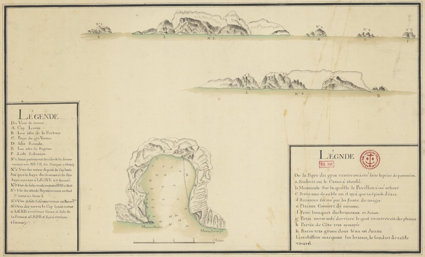 Plan de la baie dite du Gros Ventre, levée en 1772, au moment de la découverte de l'archipel des Kerguelen. Nom donné d'après celui du navire, le Gros Ventre, qui a mis à l'eau la chaloupe ayant touché terre et pris possession de l'île au nom du roi de France.